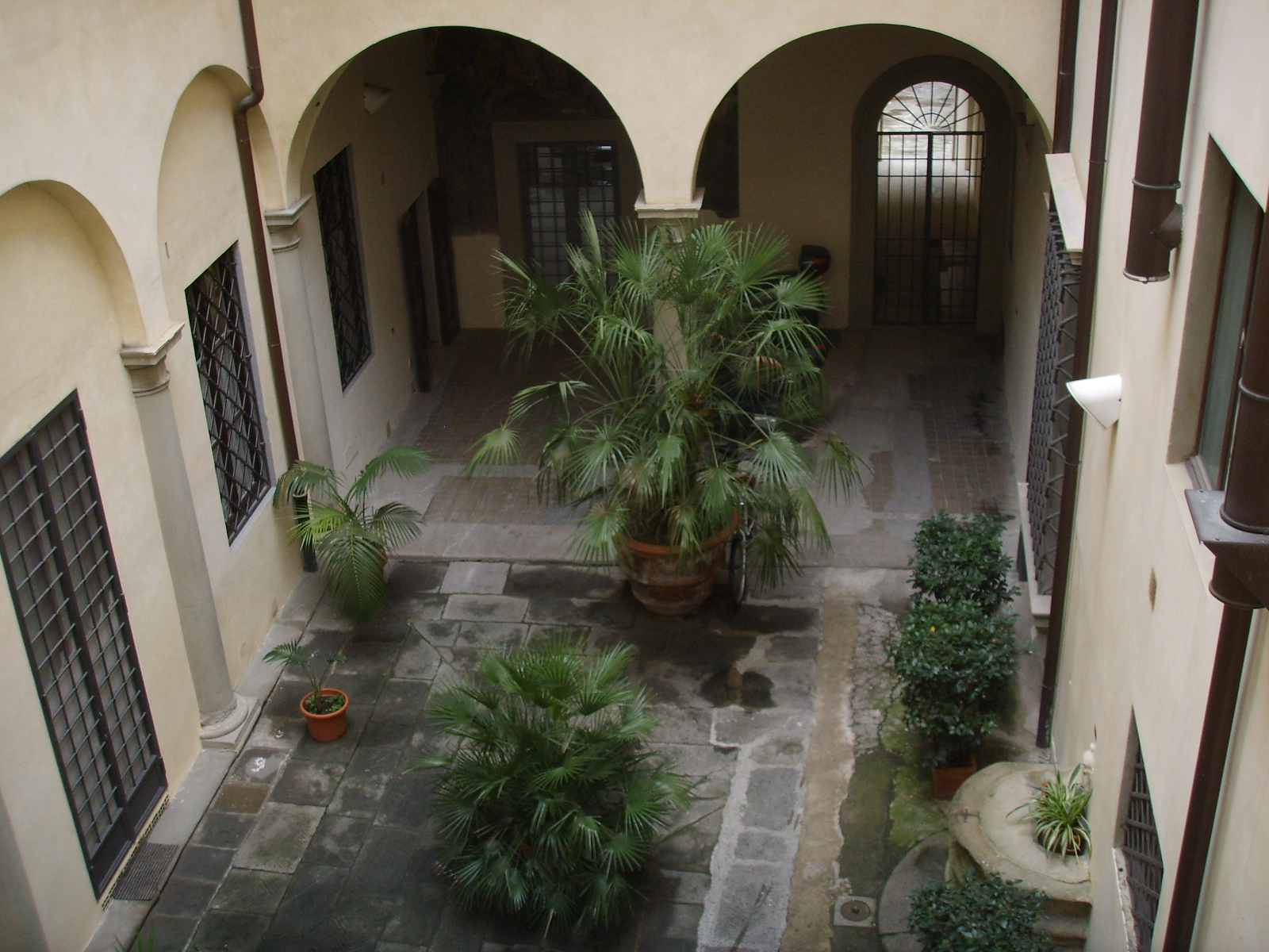 Palazzo ramirez de Montalto, cortile